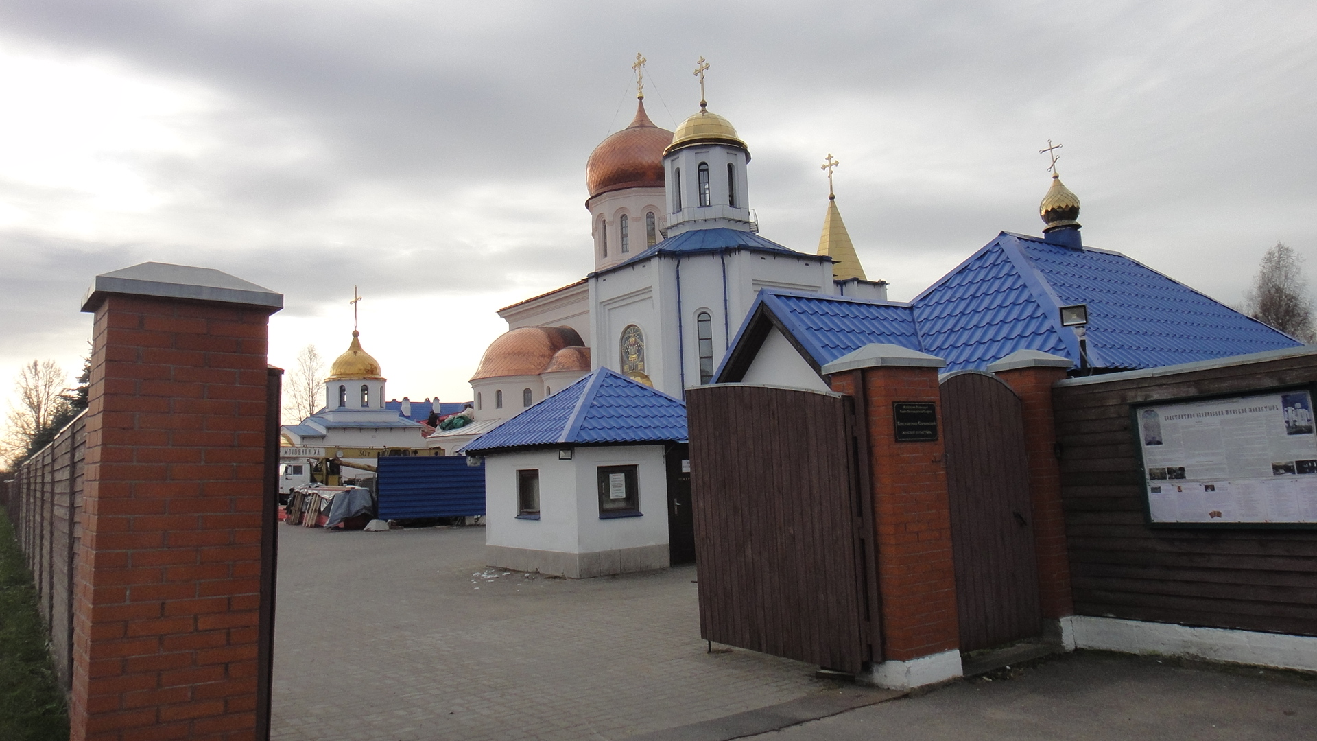 Константино-Еленинский монастырь